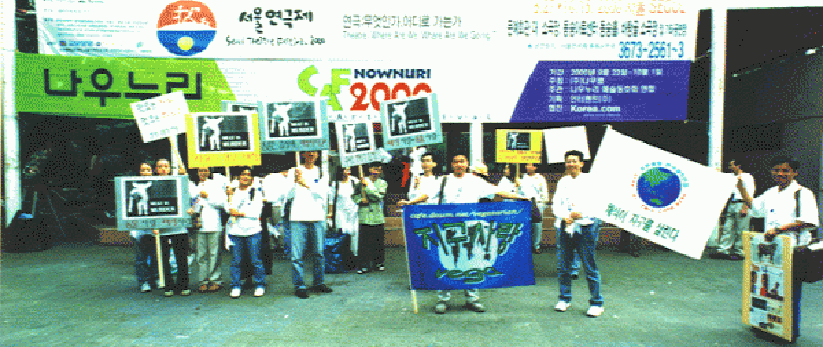 대학로 마로니에 공원에서 세계채식인의 날 행사